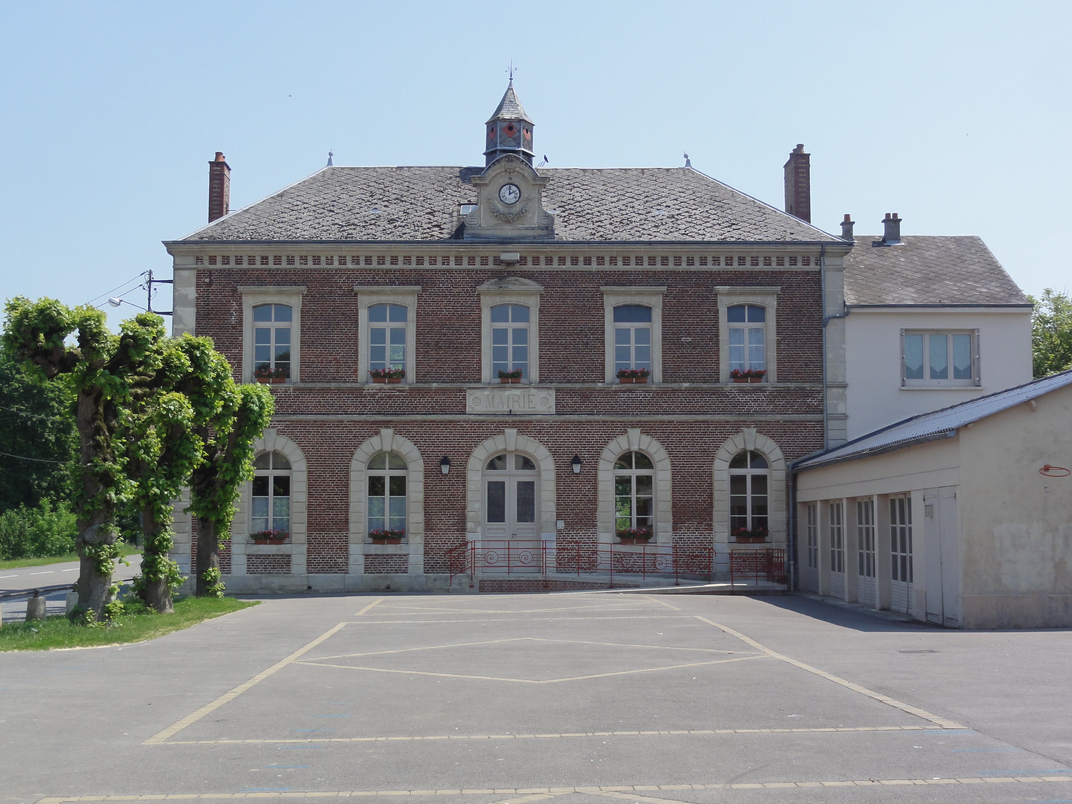 Séraincourt (Ardennes) Mairie